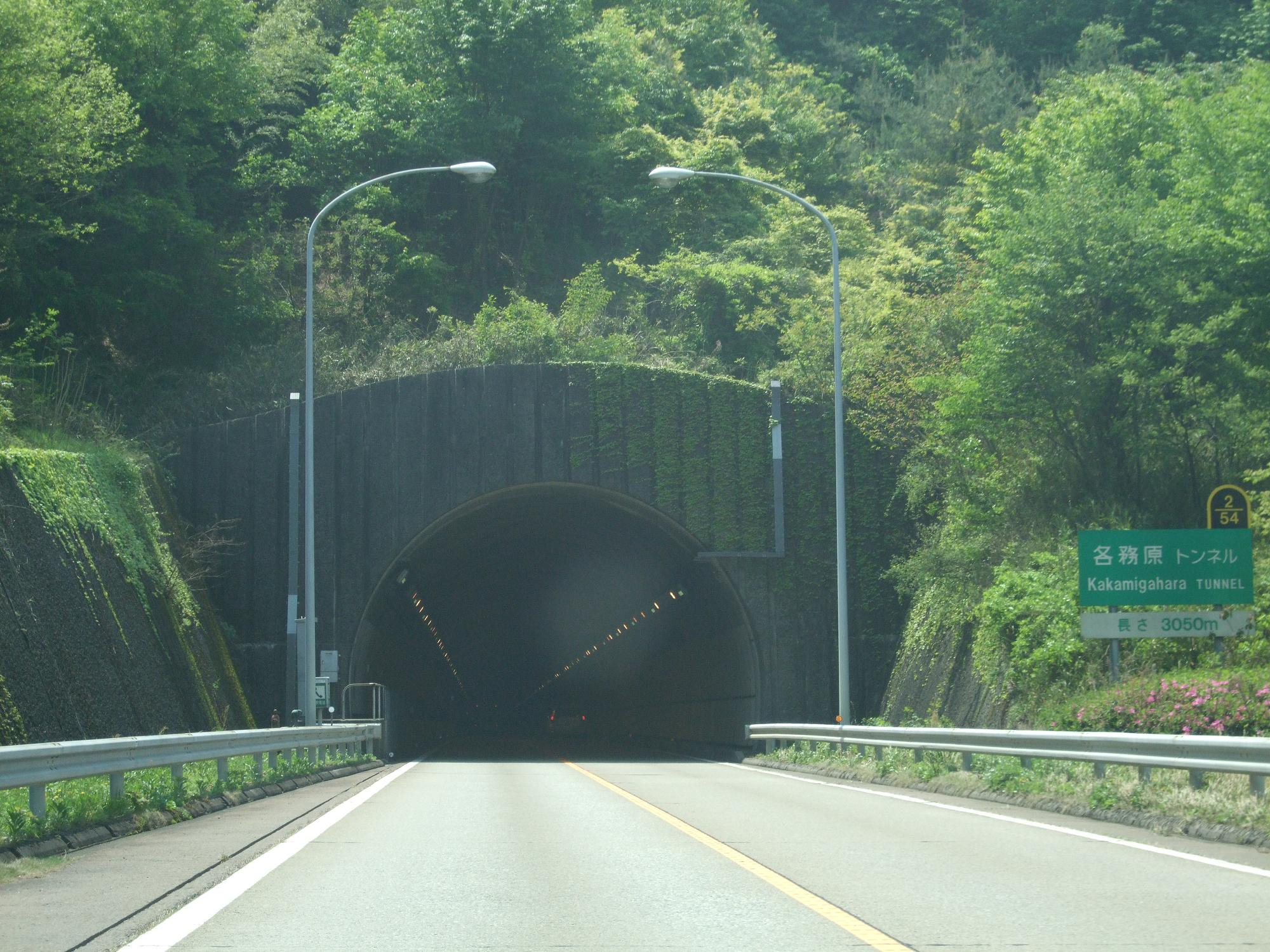 東海北陸自動車道 各務原トンネル 上り線 2008.4.27 投稿者が撮影